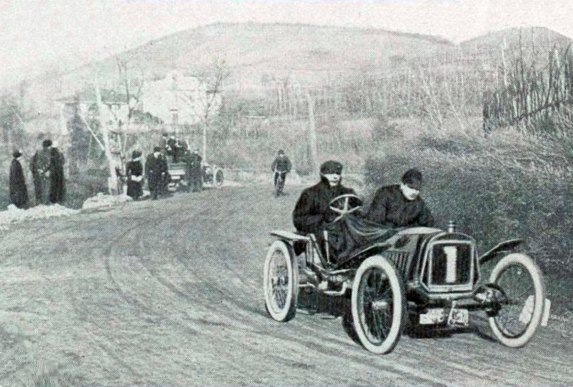 Giosuè Giuppone vainqueur de la Ière Corsa Vetturette Torino en janvier 1908 sur Lion-Peugeot - La Vie au Grand Air du 8 février 1908, p.82